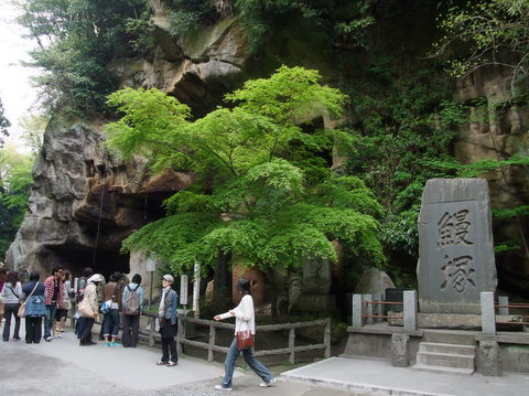 Unagitsuka at Zuiganji